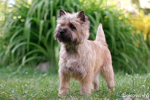 керн терьер (cairn terrier)